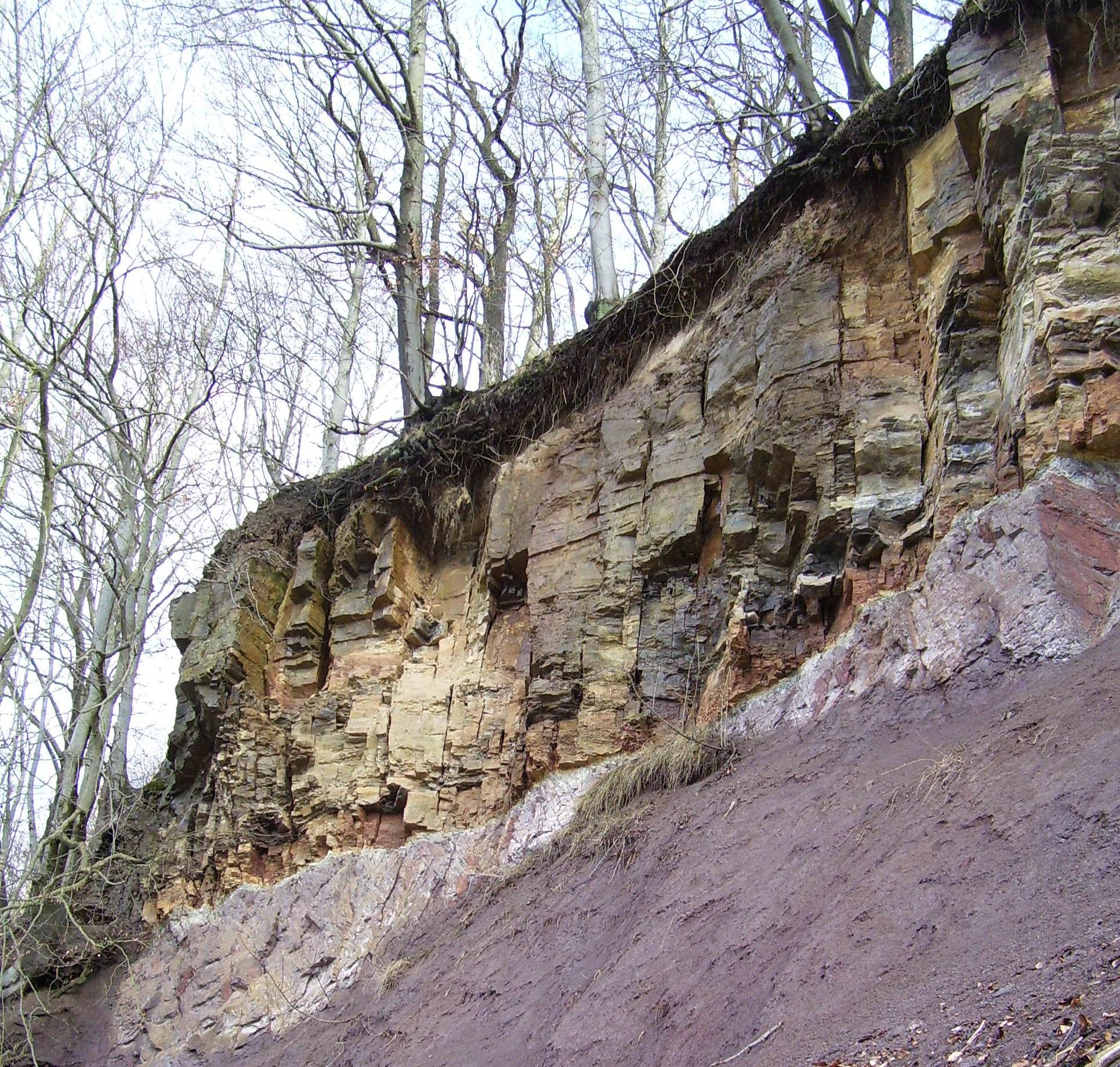 die "lange Wand" in Ilfeld (Harz), vom Wiki-User J C D selbst erstellt und gemeinfrei J C D 23:00, 29. Apr 2006 (CEST)